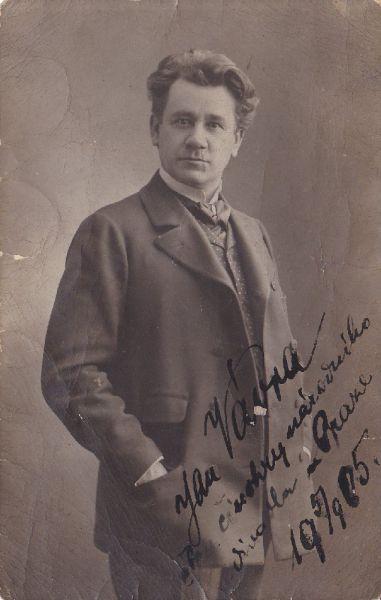 Jan Vávra (herec) - 1861-1932